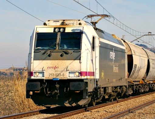 La locomotora 253.023 de Renfe Operadora amb un mercaderies, per la ínia Barcelona-Vilafranca-Sant Vicenç de Calders a l'altura de Lavern.